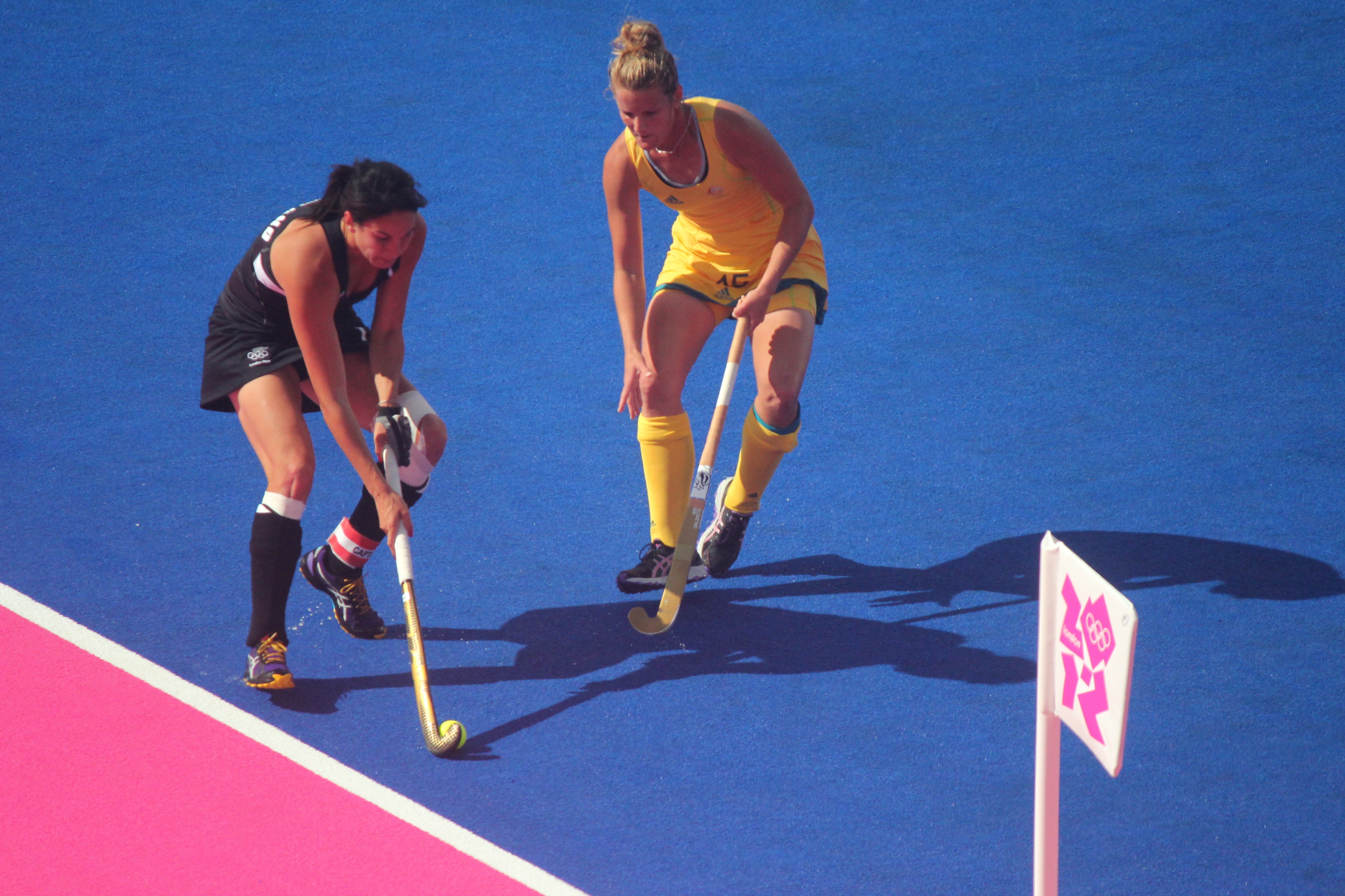 Kobie McGurk (right)